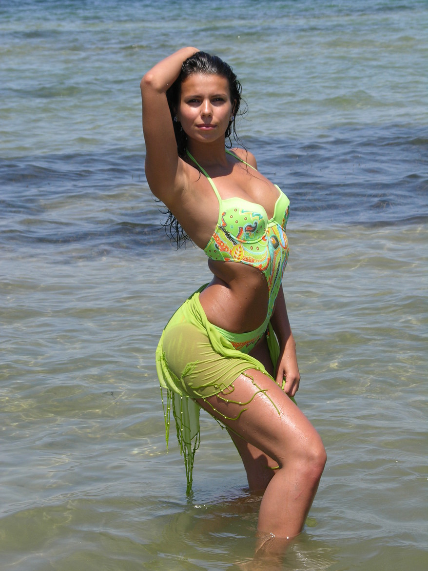 Женщина в купальном костюме